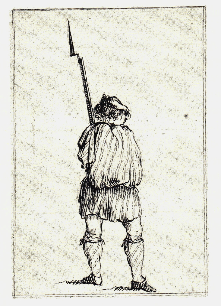 Набросок, сделанный неизвестным автором во время якобитского восстания 1745 года в Шотландии, в г. Пеникуик.